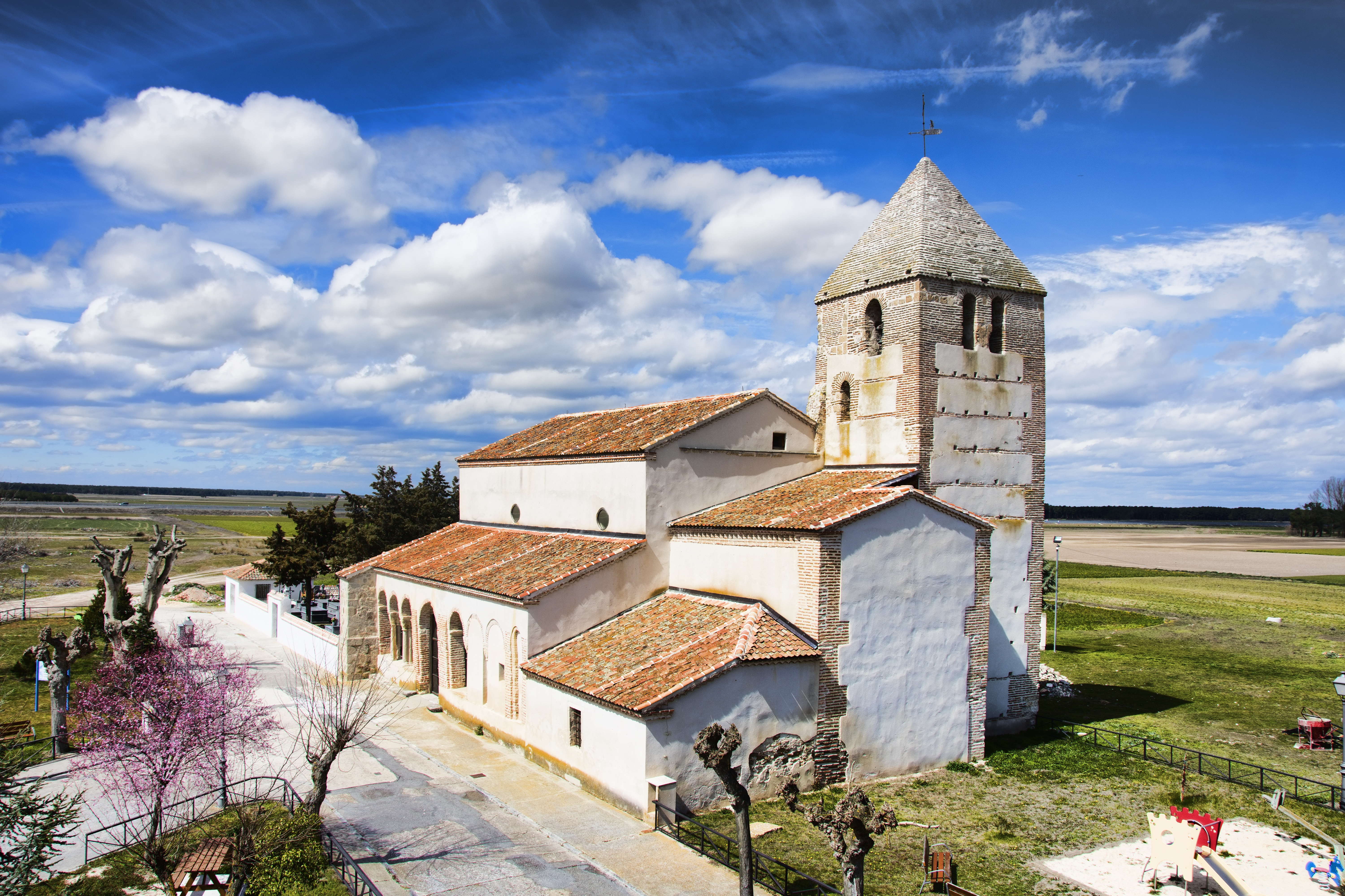 Iglesia de la Asunción, en Villarejos